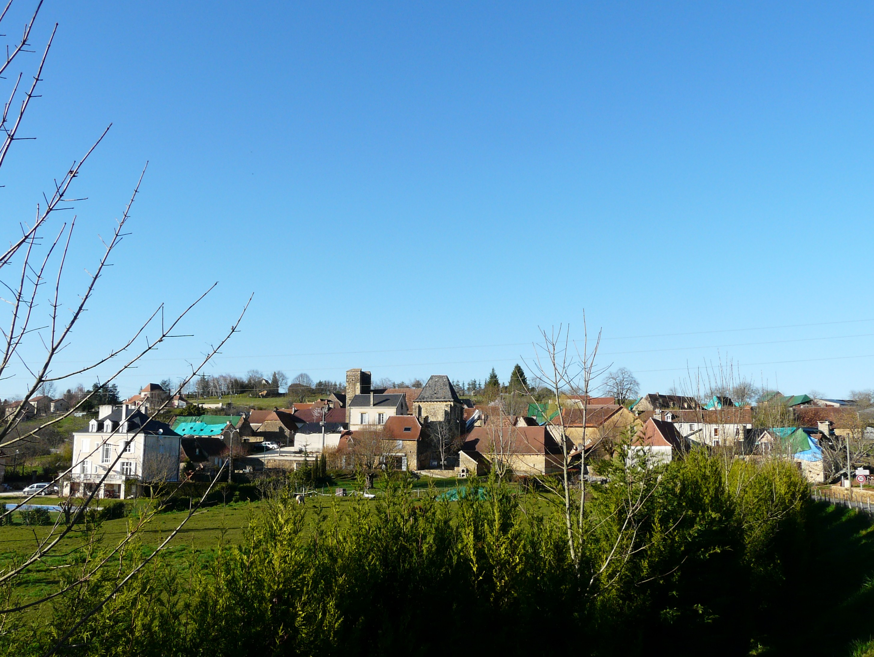 Le village de Preyssac-d'Excideuil, Dordogne, France.